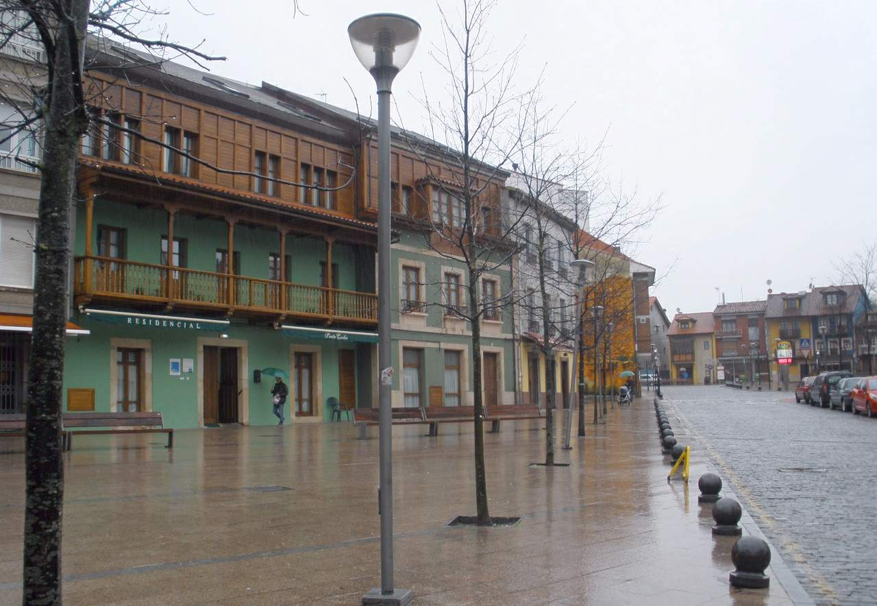 Pola de Siero (Asturias)